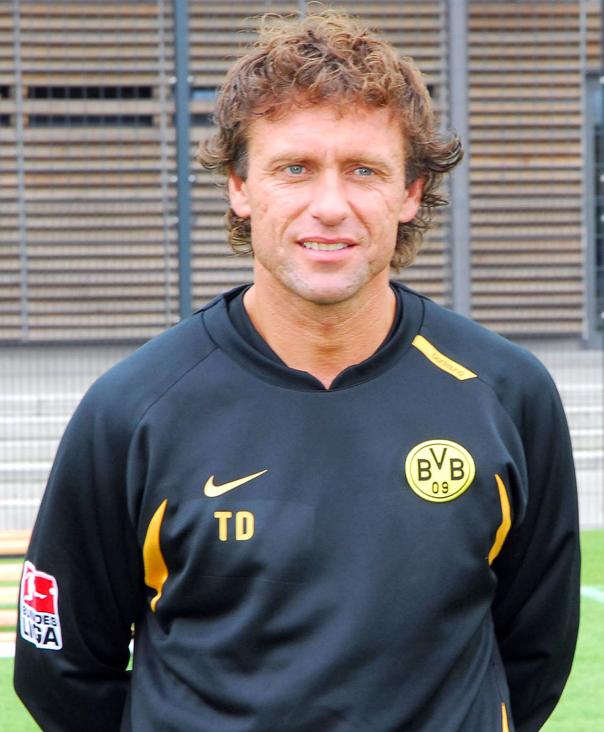 Thomas Doll bei der Mannschaftsvorstellung